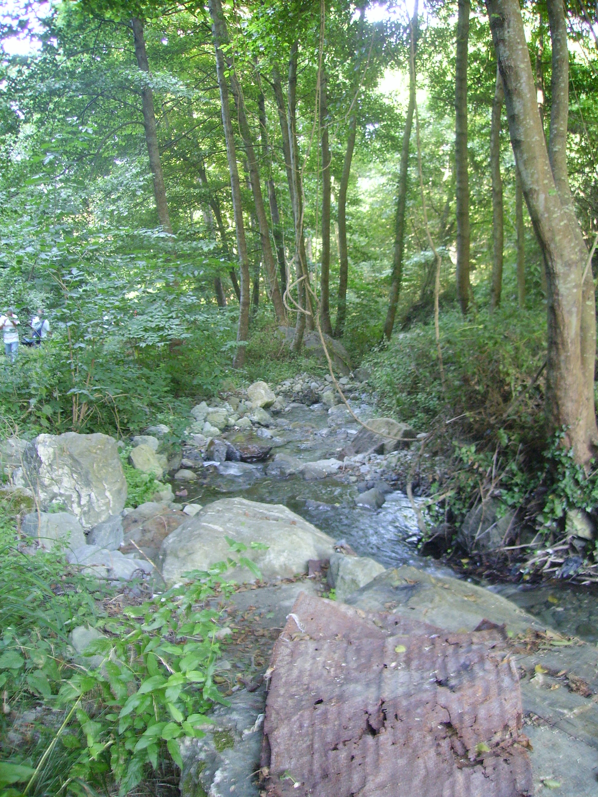 Un tratto del Verre a Belmonte